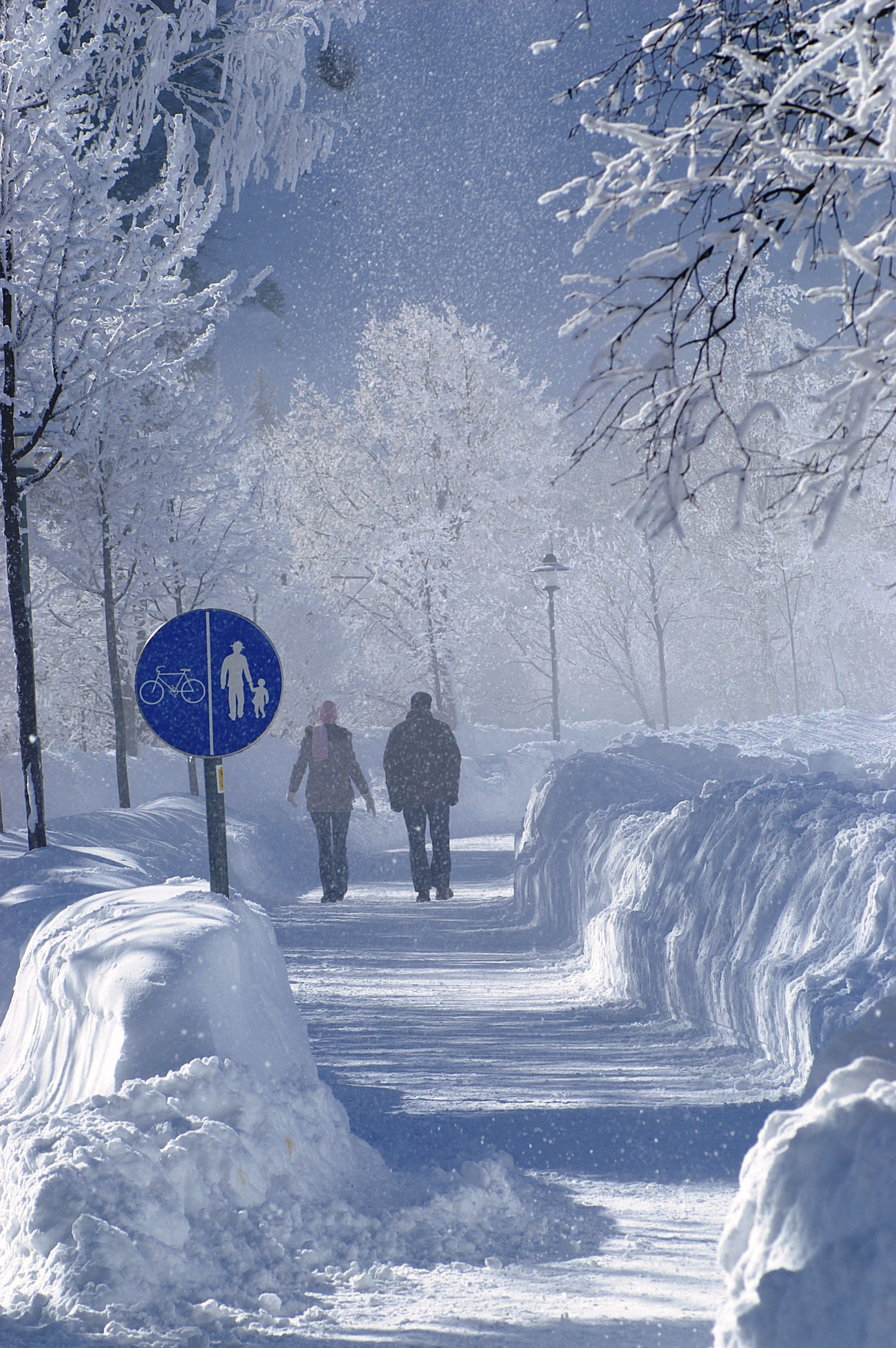 Winter am Achensee in Tirol.